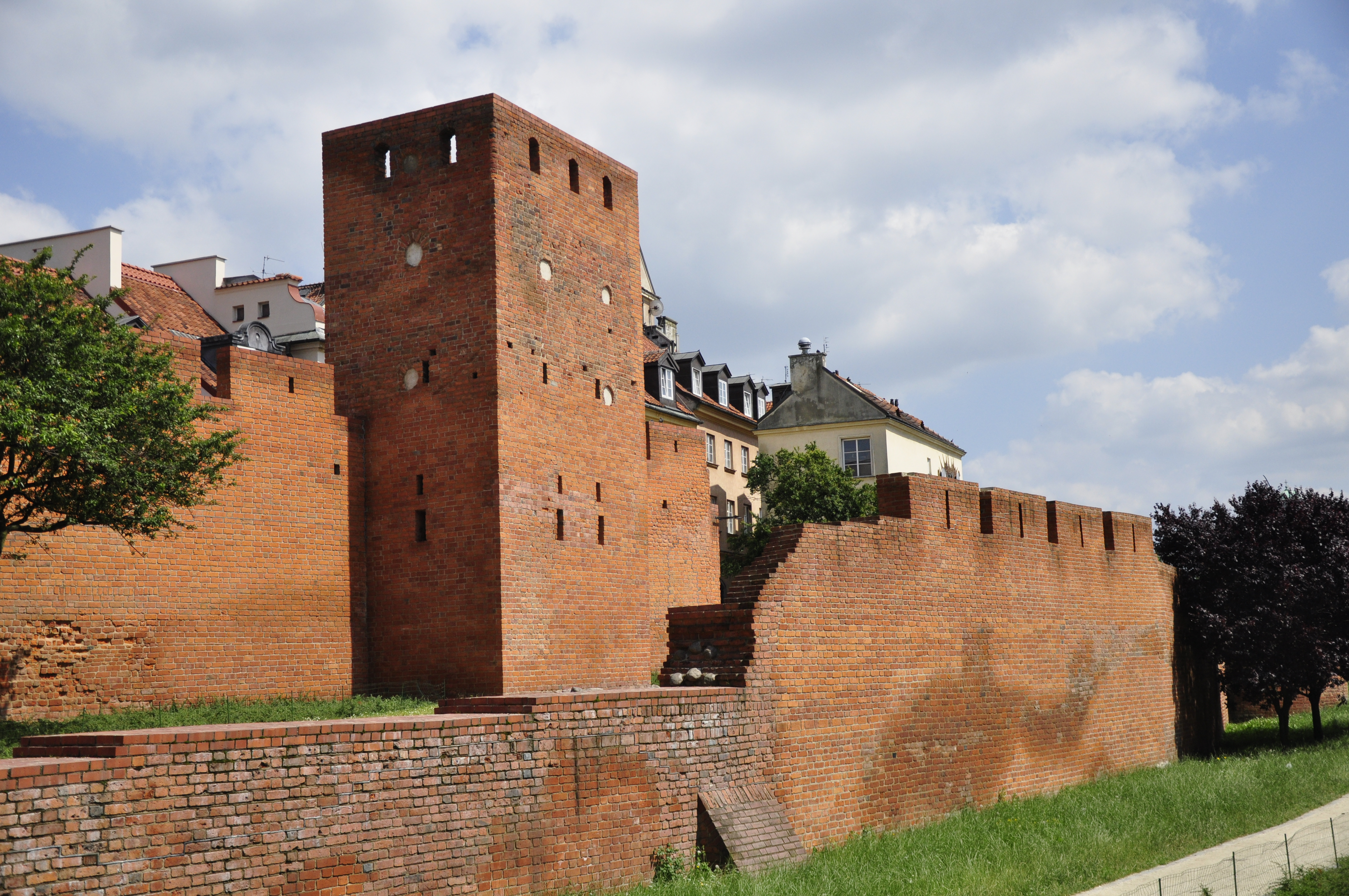 Warschau, Stadtmauer Altstadt